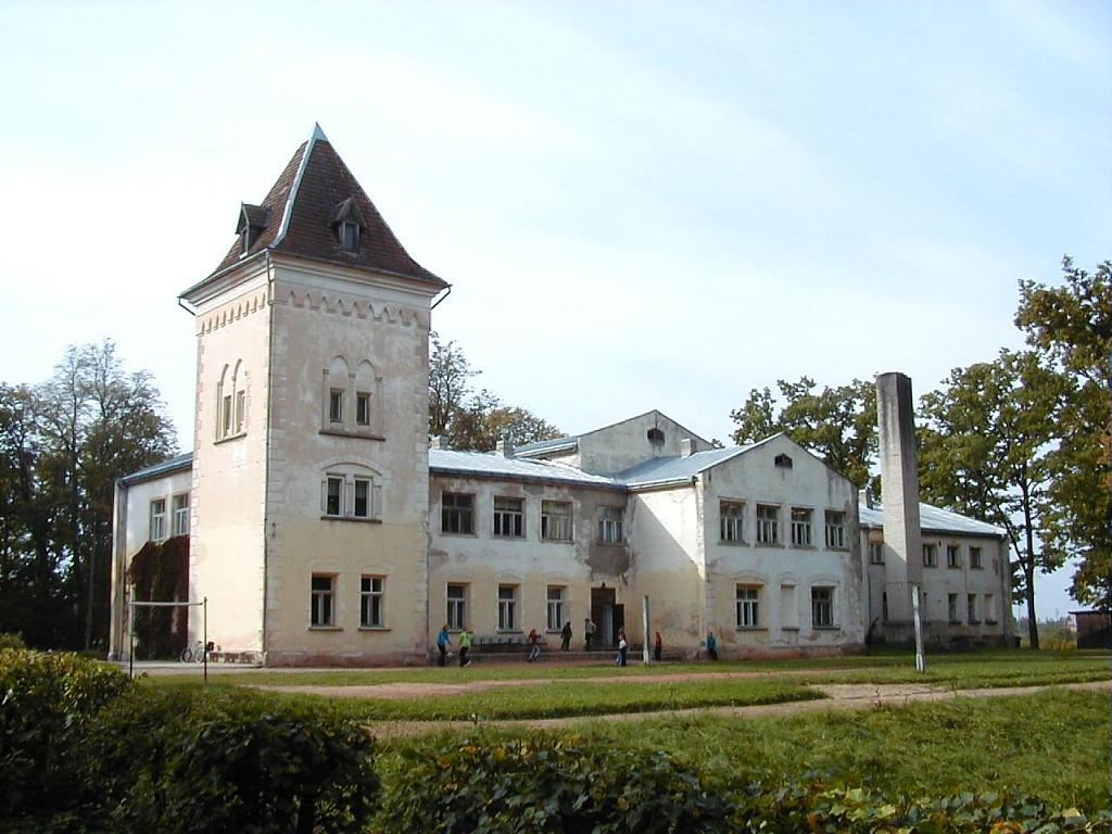 Druvienas muižas pils 2001-09-21